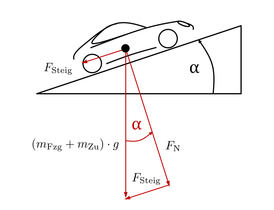 Prinzipskizze zum Steigungswiderstand an Fahrzeugen